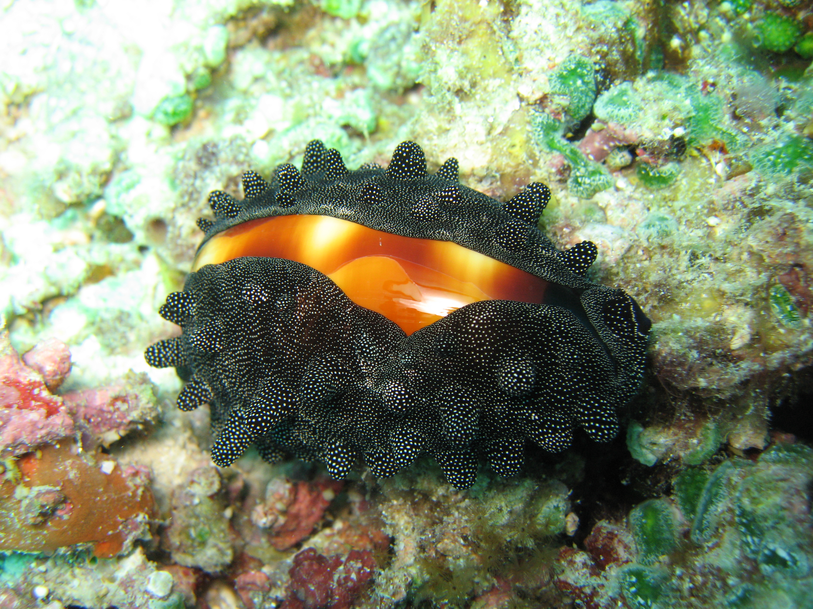 Talparia talpa in Mactan Cebu, Philippines